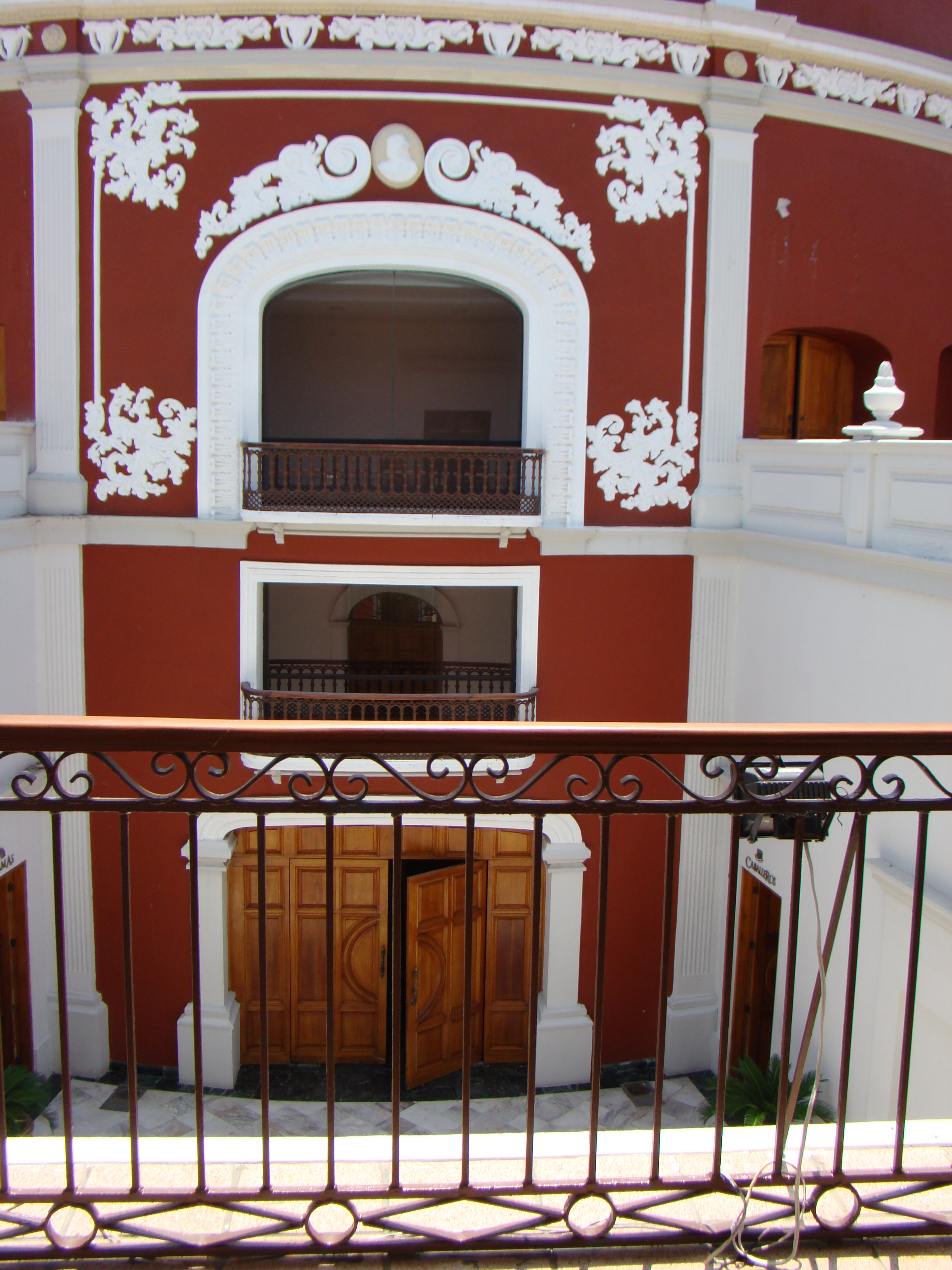 Fachada central del Teatro Ángela Peralta en Mazatlán